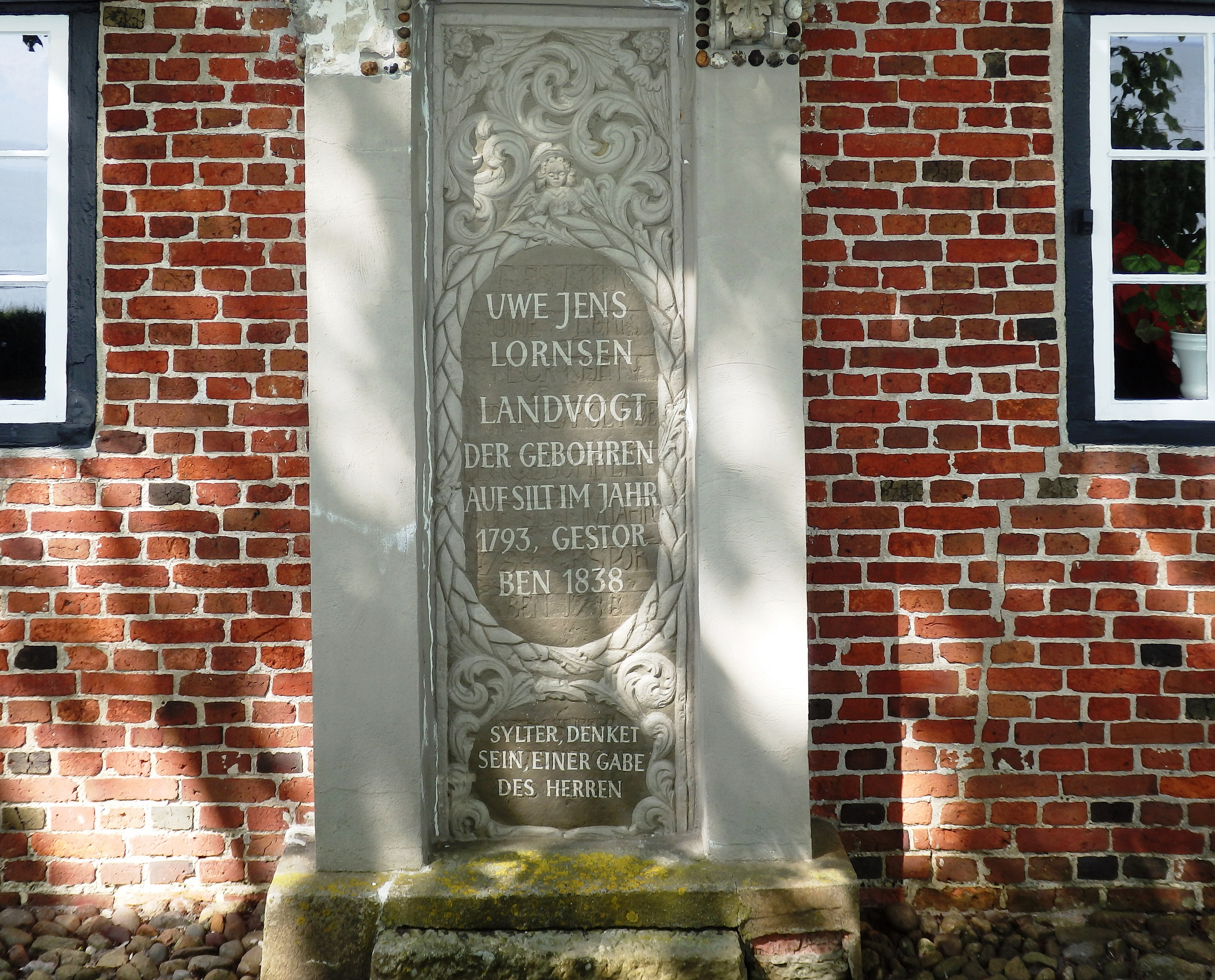 Gedenktafel für Uwe Jens Lornsen am Altfriesischen Haus, Keitum